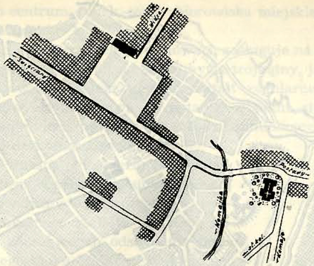 Беларуская (тарашкевіца): Гадуцішкі (Haduciški). Плян мястэчка